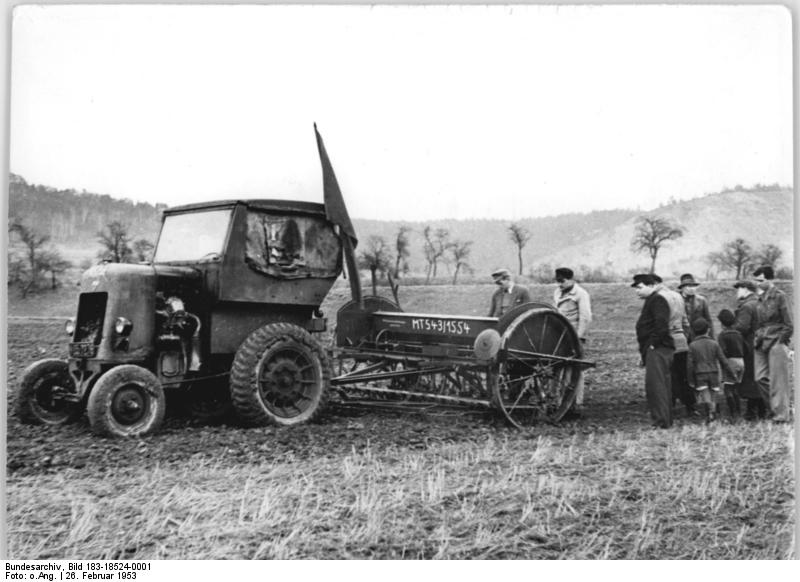 LPG Drackendorf, feierlicher Beginn der Aussaat Zentralbild 26.2.1953 Die Frühjahrsbestellung hat begonnen. Mit Fahnen und Transparenten begaben sich die Mitglieder der Landwirtschaftlichen Produktionsgenossenschaft "Fred Oelsner" Drackendorf, Jena-Land, am 24. Februar 1953 auf ihre Felder, um mit der Frühjahrsbestellung zu beginnen.